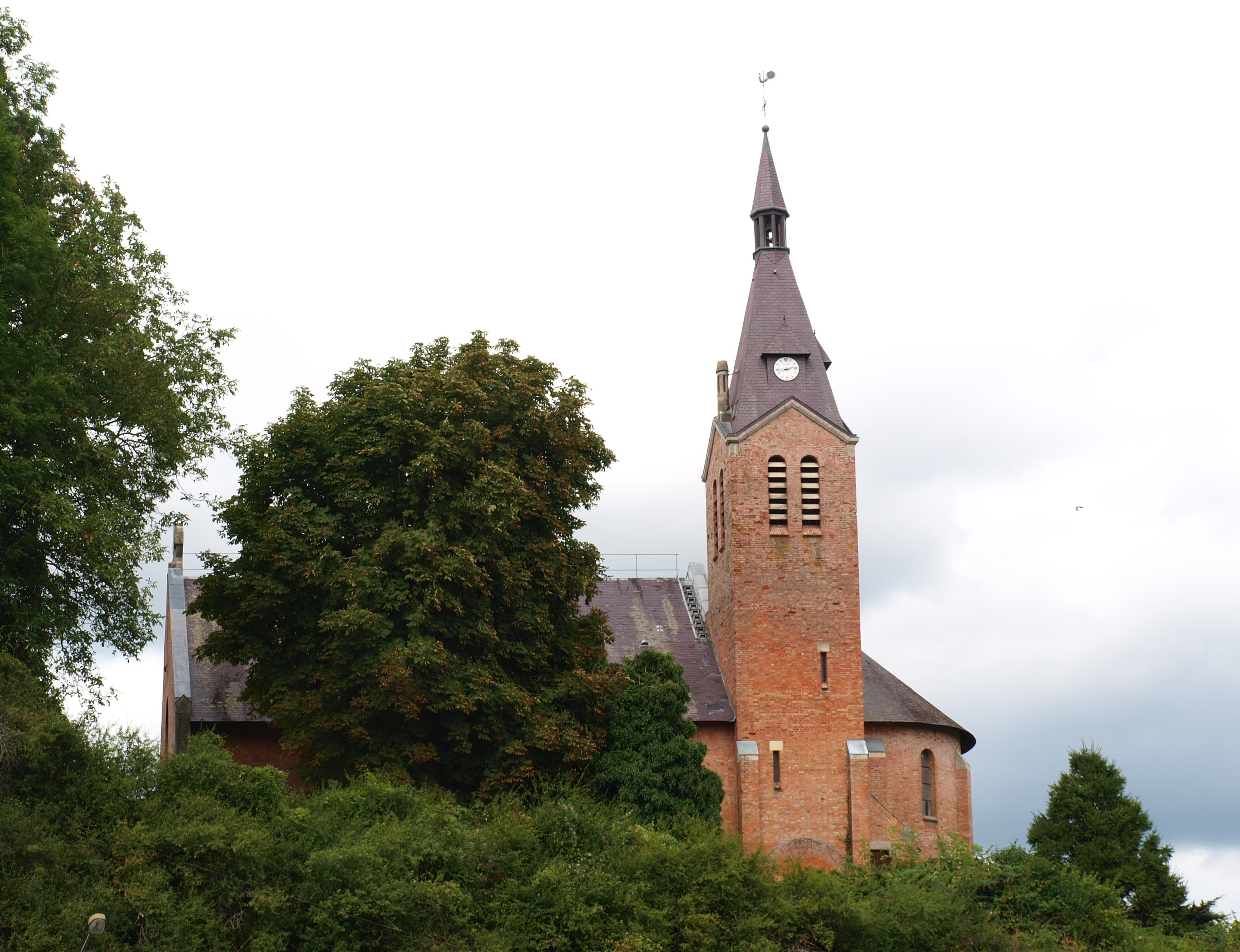 Autry (Ardennes, France) ; église